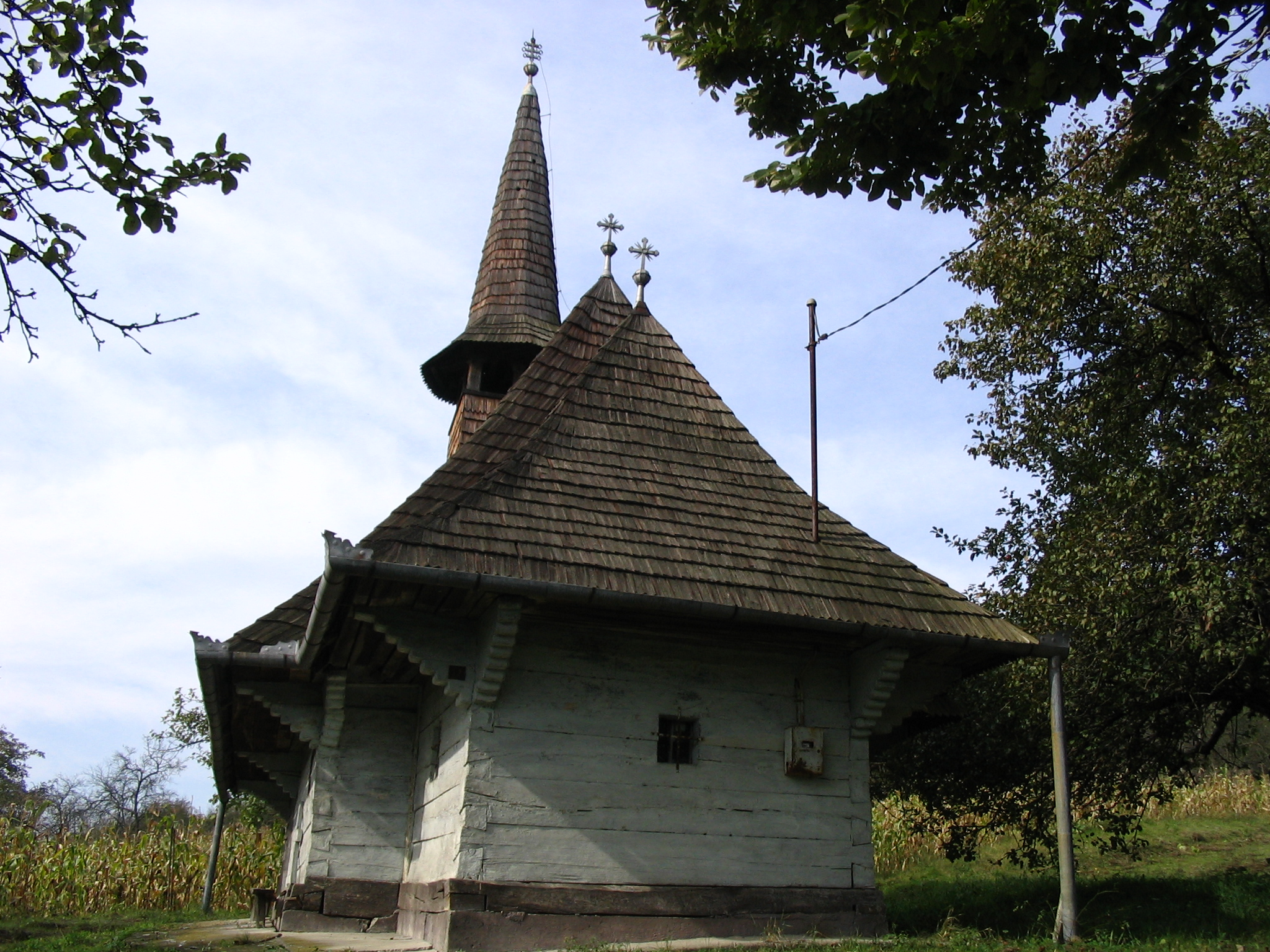 Biserica de lemn din Zalnoc, Sălaj. Autor: Bogdan Ilieş Data: octombrie 2005